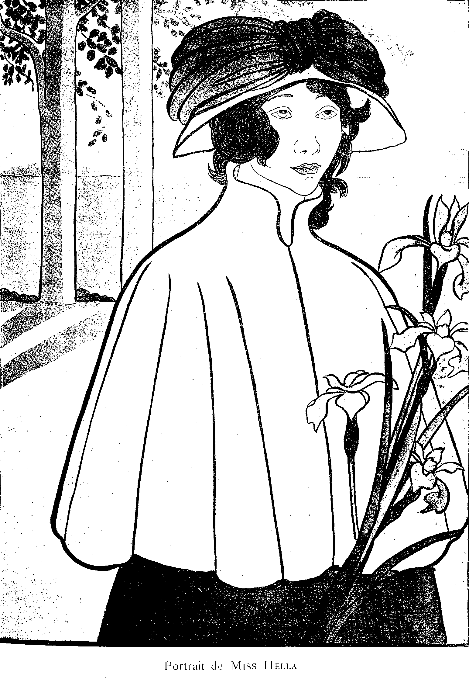 Portrait de Miss Hella, aquarelle de Melle Madeleine Dauphin, L'Aube méridionale, 1899.